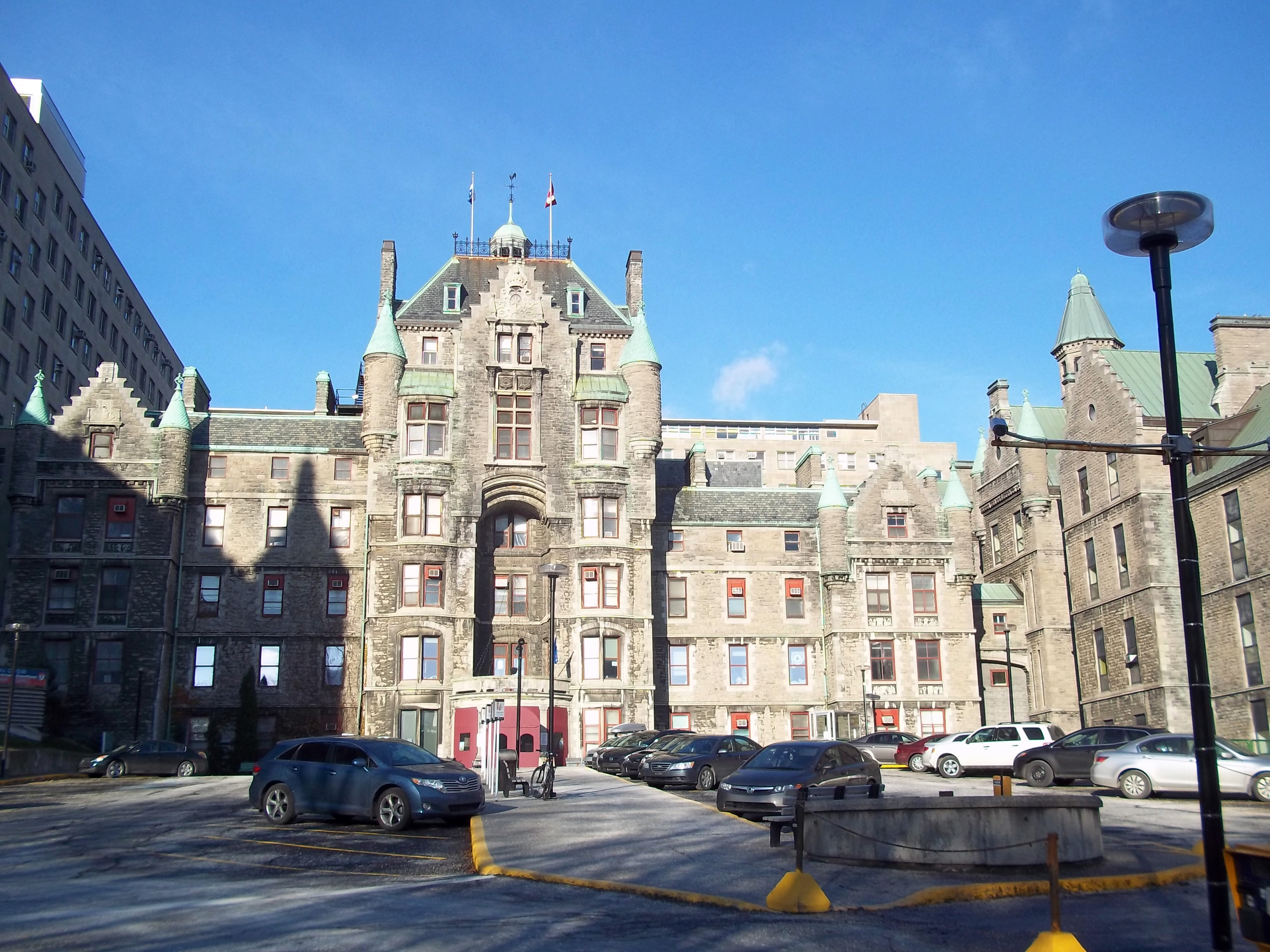 Hôpital Royal Victoria, 687, avenue des Pins Ouest, Montréal (info)